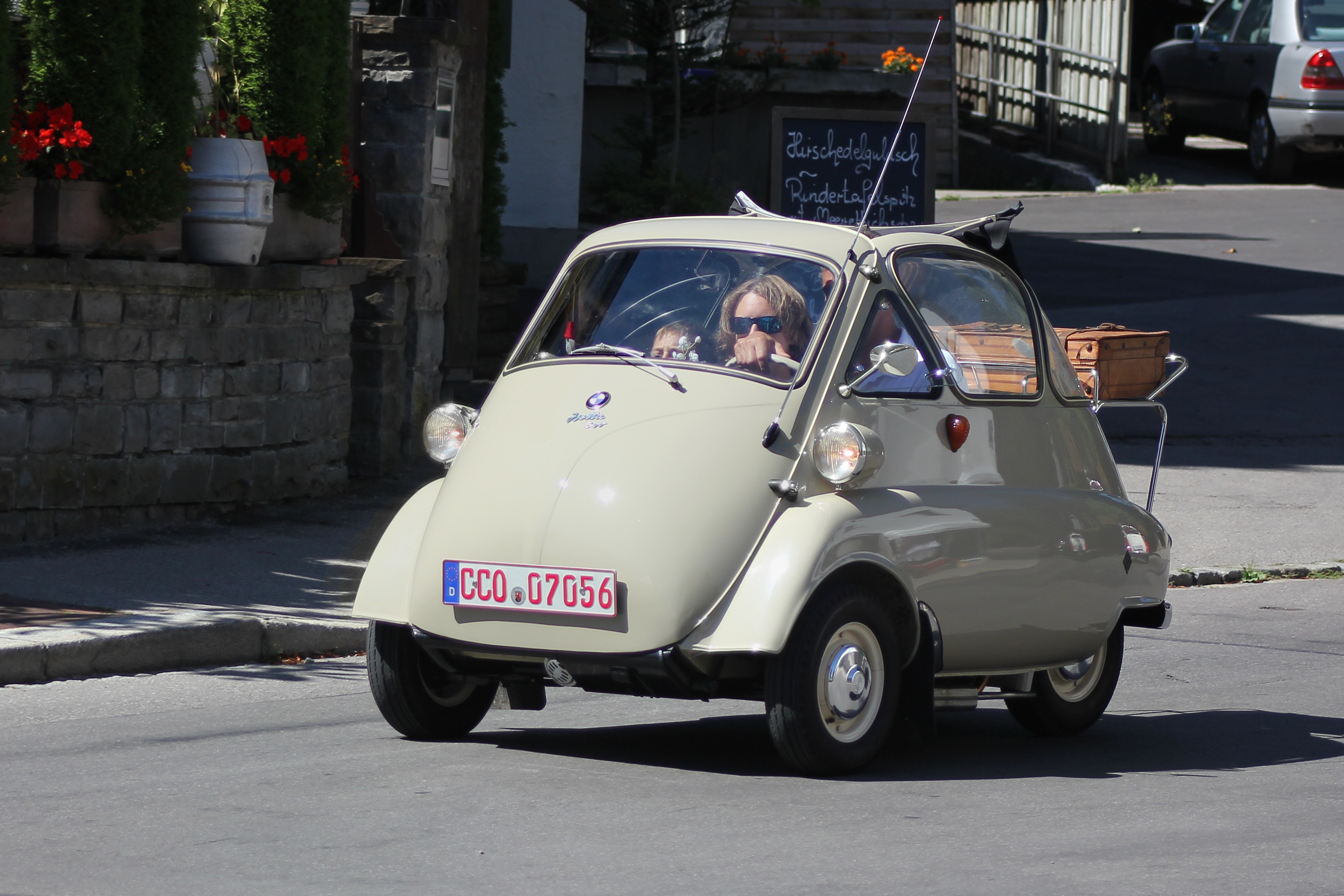 BMW Isetta 300, Baujahr 1956, bei der Ausfahrt des Isetta-Treffens in Bad Wörishofen (Kennzeichen des Fahrzeugs verändert)